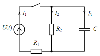 Пример линейной электрической цепи